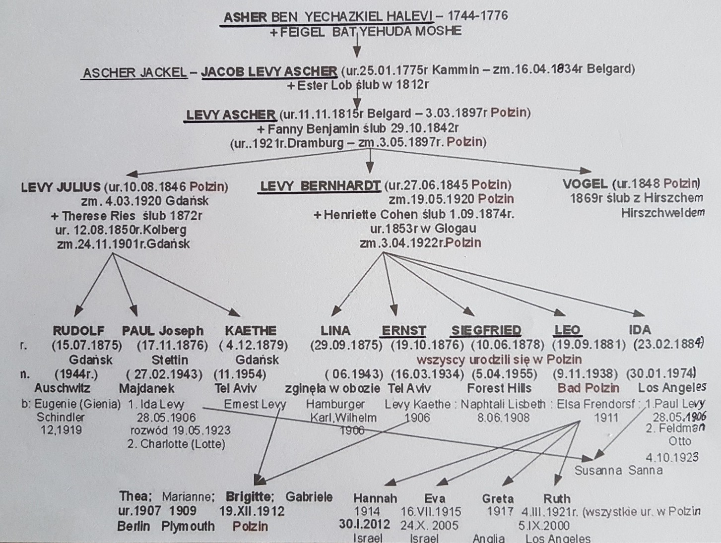 Schemat Genealogii Rodu Levych